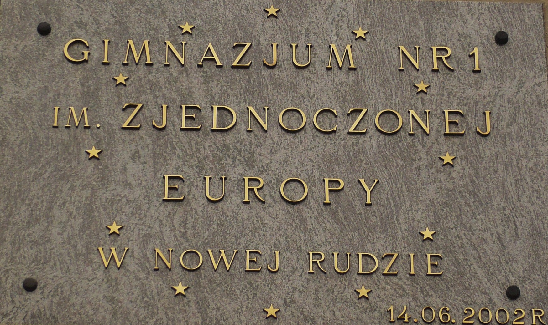 Gimnazjum Nr 1. Tablica